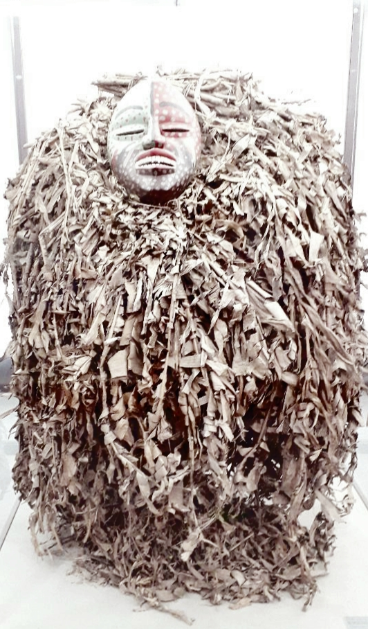 Kiswahili: Mavazi ya mchezaji aliye na maski-D.R.Congo